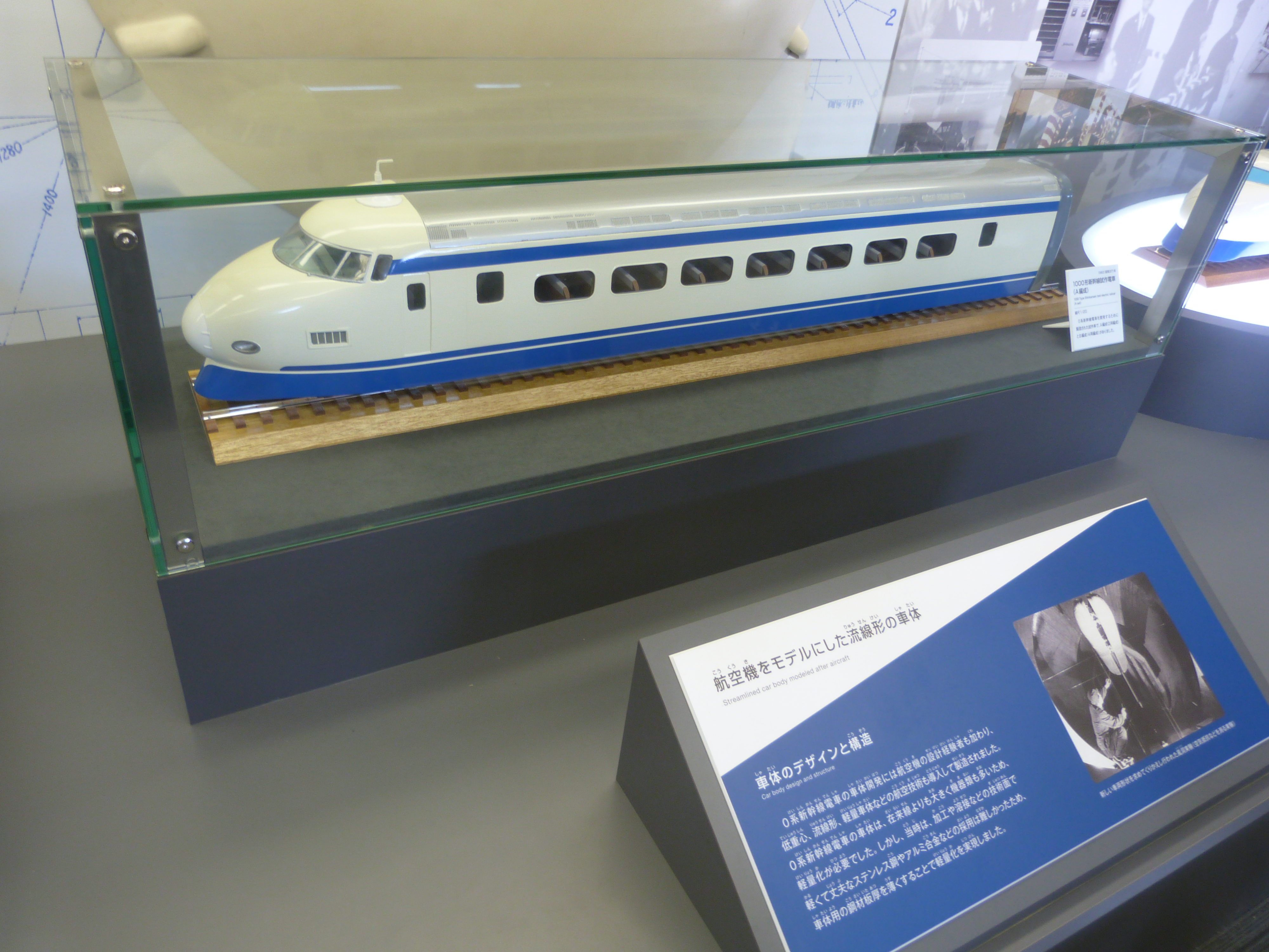 新幹線1000形A編成の模型（京都鉄道博物館にて展示）。